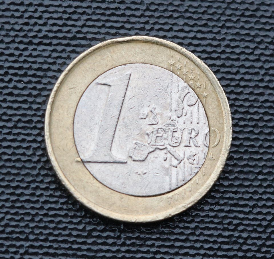 Die Pille der Münze ist in diesem Fall nach rechts unten verzogen. Diese Art der Fehlprägung wird unter Sammlern umgangssprachlich "Spiegelei" genannt.